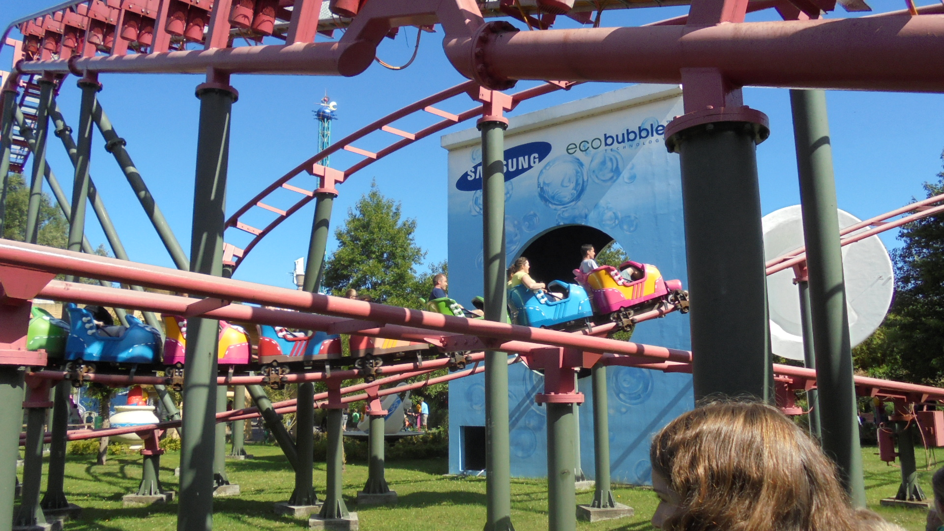 Rollerskater